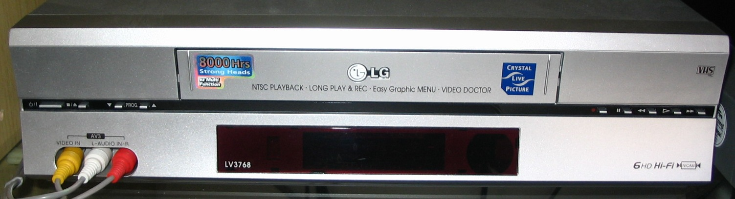 Współczesny magnetowid